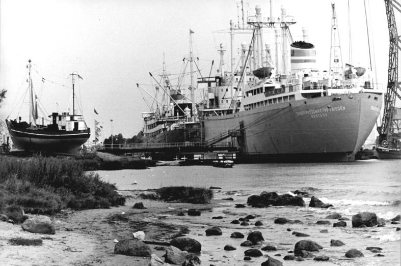 Rostock, Traditionsschiff Typ "Frieden" ADN-ZB Sindermann 23.8.82-pra - Rostock: Mehr als ein technisches Denkmal ist das Rostocker Traditionsschiff Typ "Frieden", das am Ufer der Warnow-Mündung vor über 10 Jahren für imer festgemacht hat. Jährlich besuchen rund 300.000 In- und Ausländer den 10 000-Tonnen-Frachter. Auch ein 17 Meter langer Holzkutter (l.) ist zur Besichtigung umgebaut worden. - siehe auch 1982-0823-3N